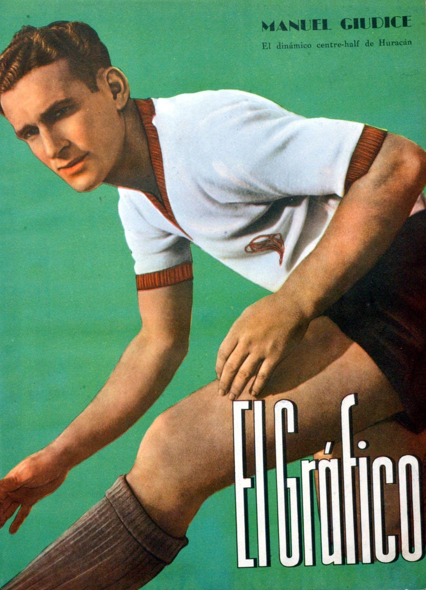 El Grafico del 28 de Julio de 1939. Edicion 1046